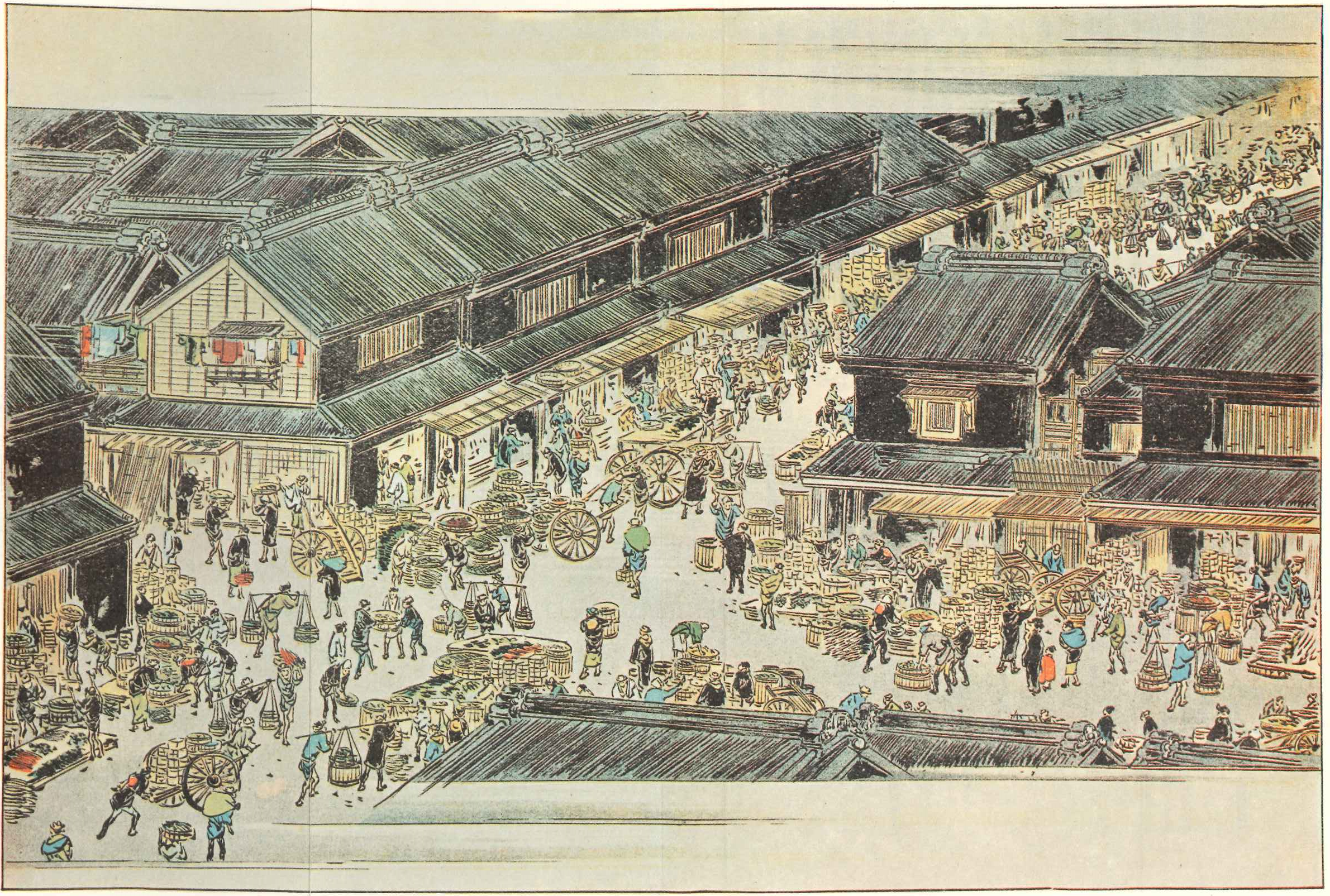 明治３３年の作成された神田市場の様子